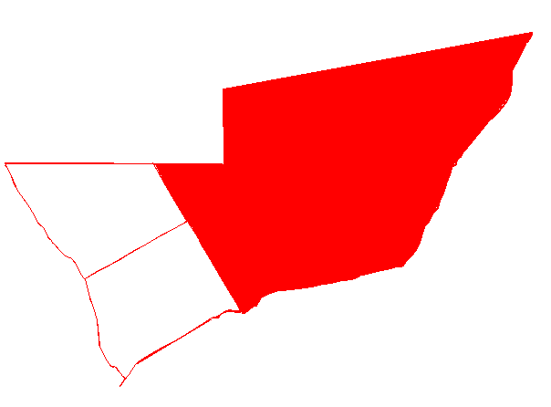 Ubicación de la Parroquia Rafael Urdaneta en el municipio Simón Bolívar, Zulia, Venezuela